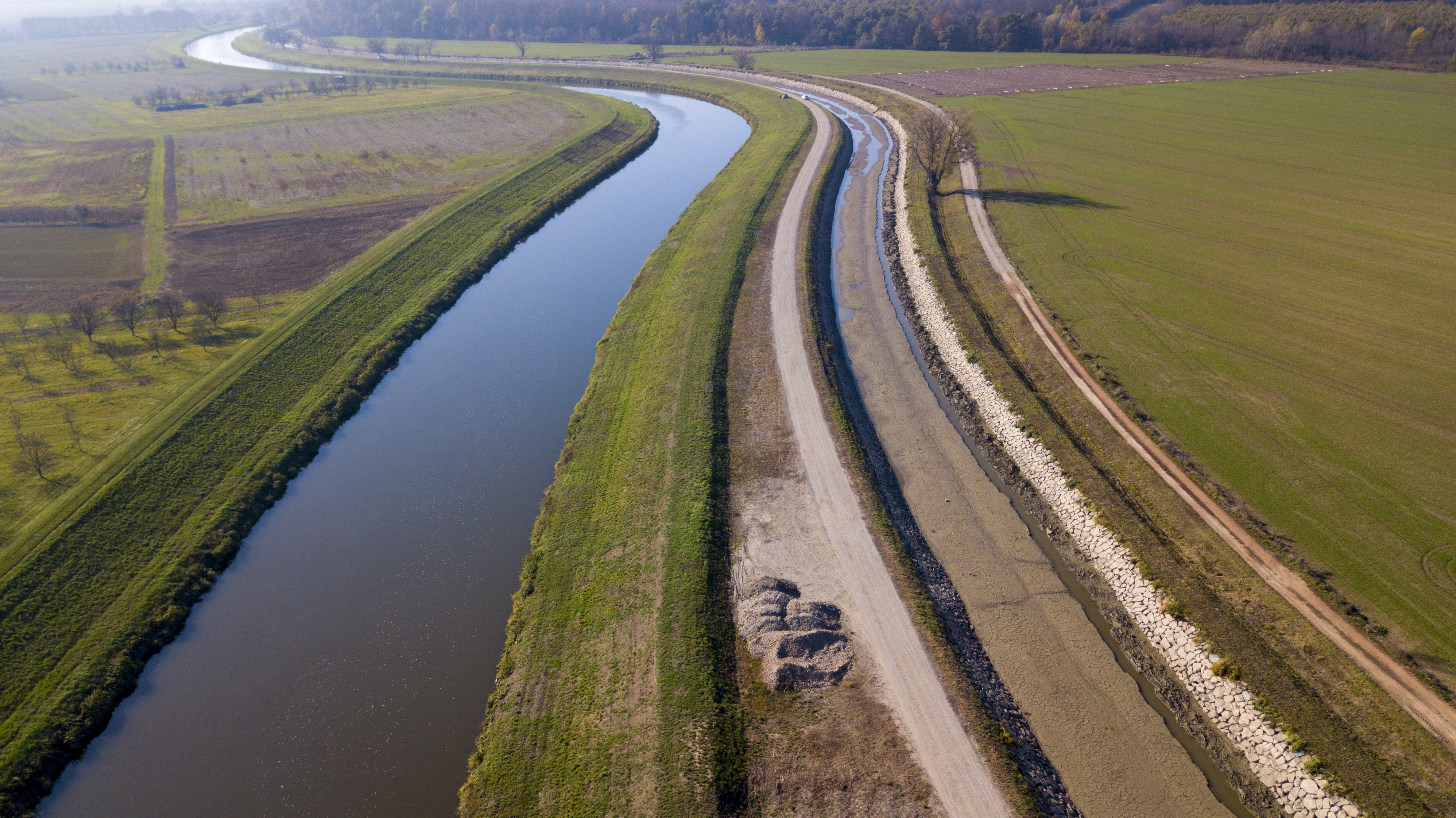 Řeka Morava (vlevo) a vypuštěné koryto Baťova kanálu (vpravo) s s patrným obložením břehů lomovým kamenem. Lokalita: N 48°56.28242', E 17°20.74150' Autor: R. Durna